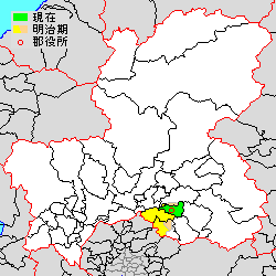 岐阜県可児郡の範囲